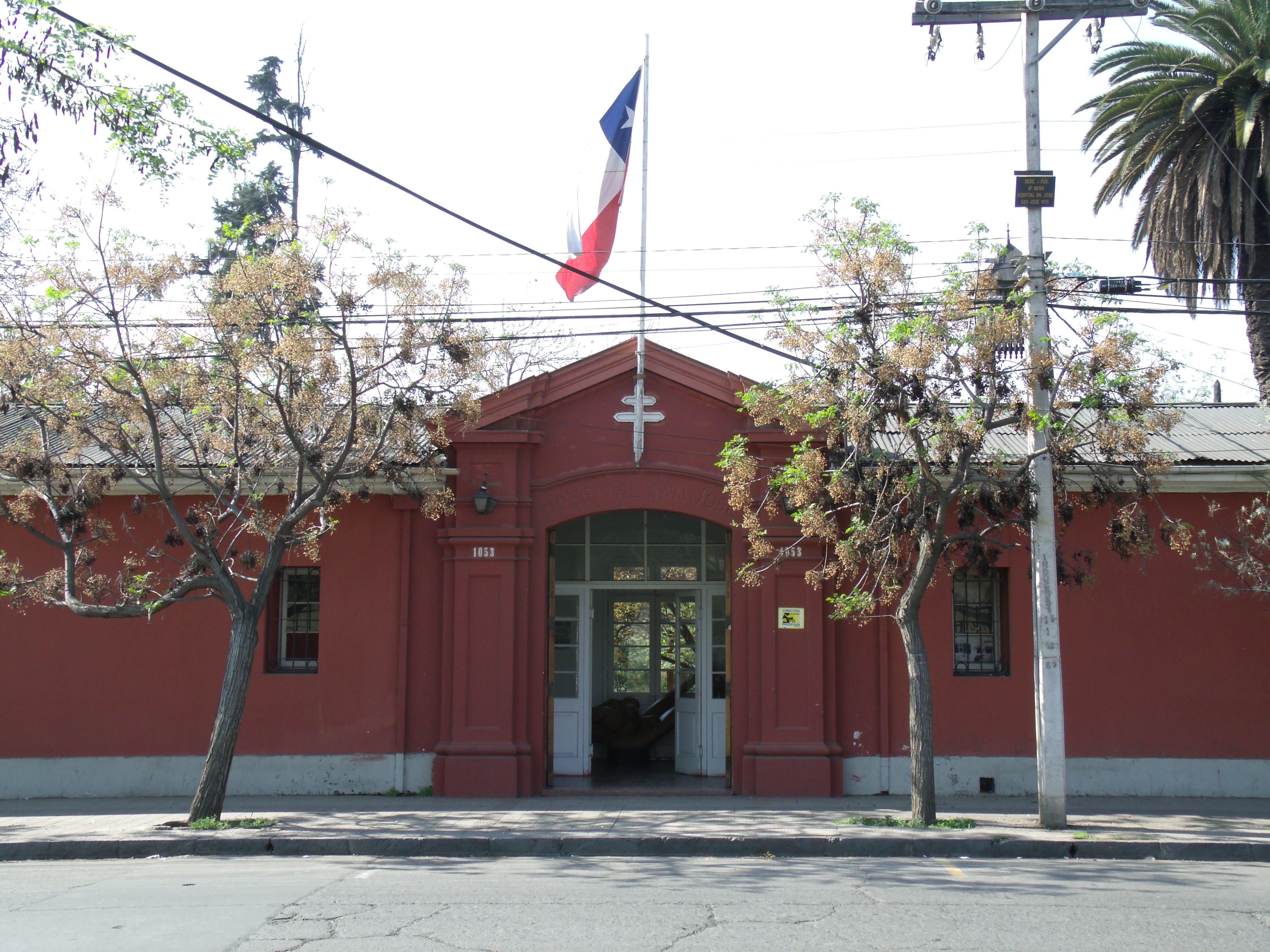 Antiguo Hospital San José This is a photo of a national monument in Chile: 408